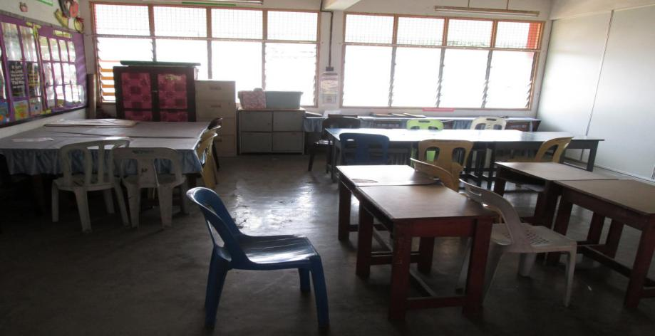 Proses Sebelum 3